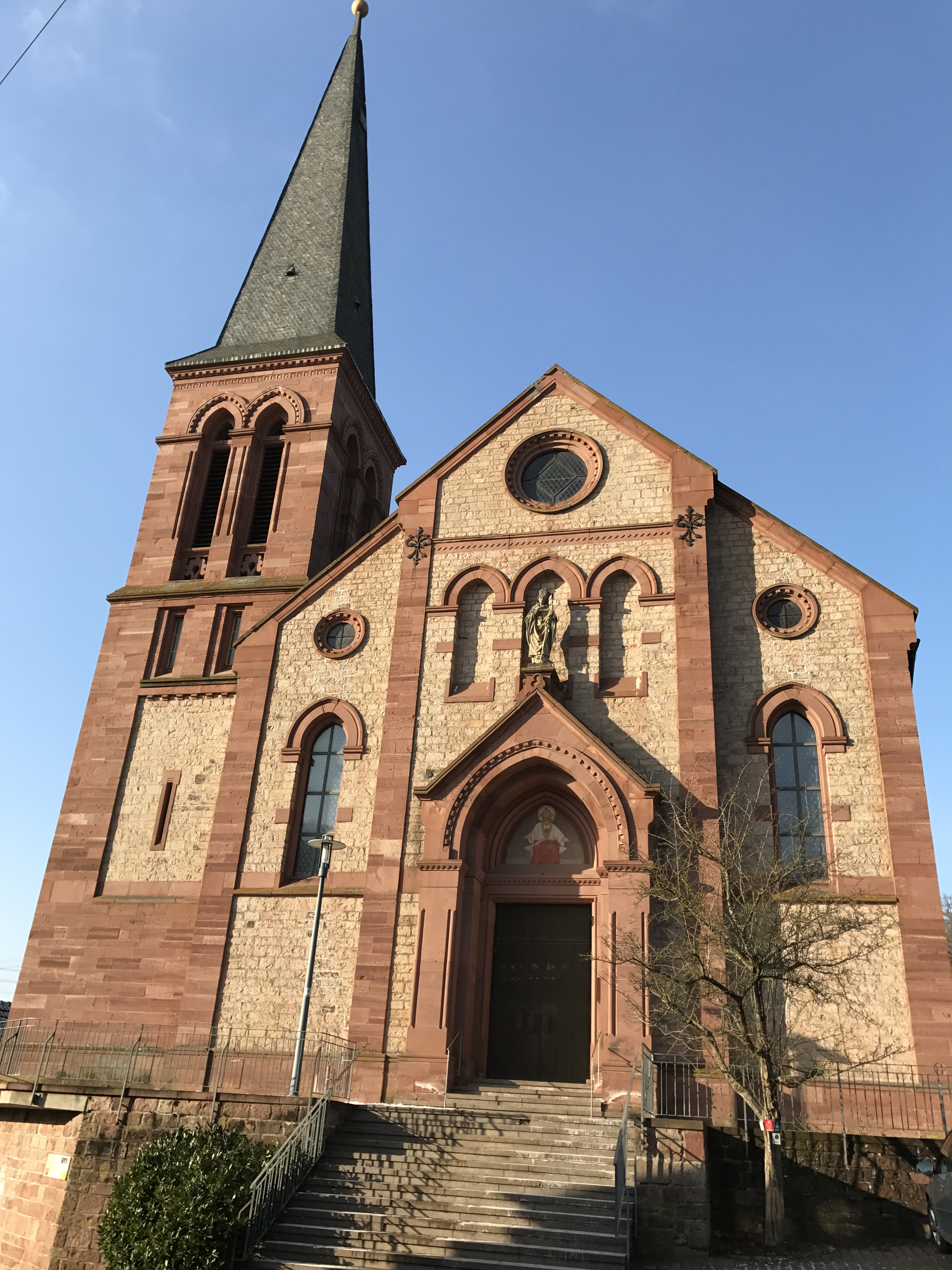 Die Martinskirche in Gamburg im Main-Tauber-Kreis.